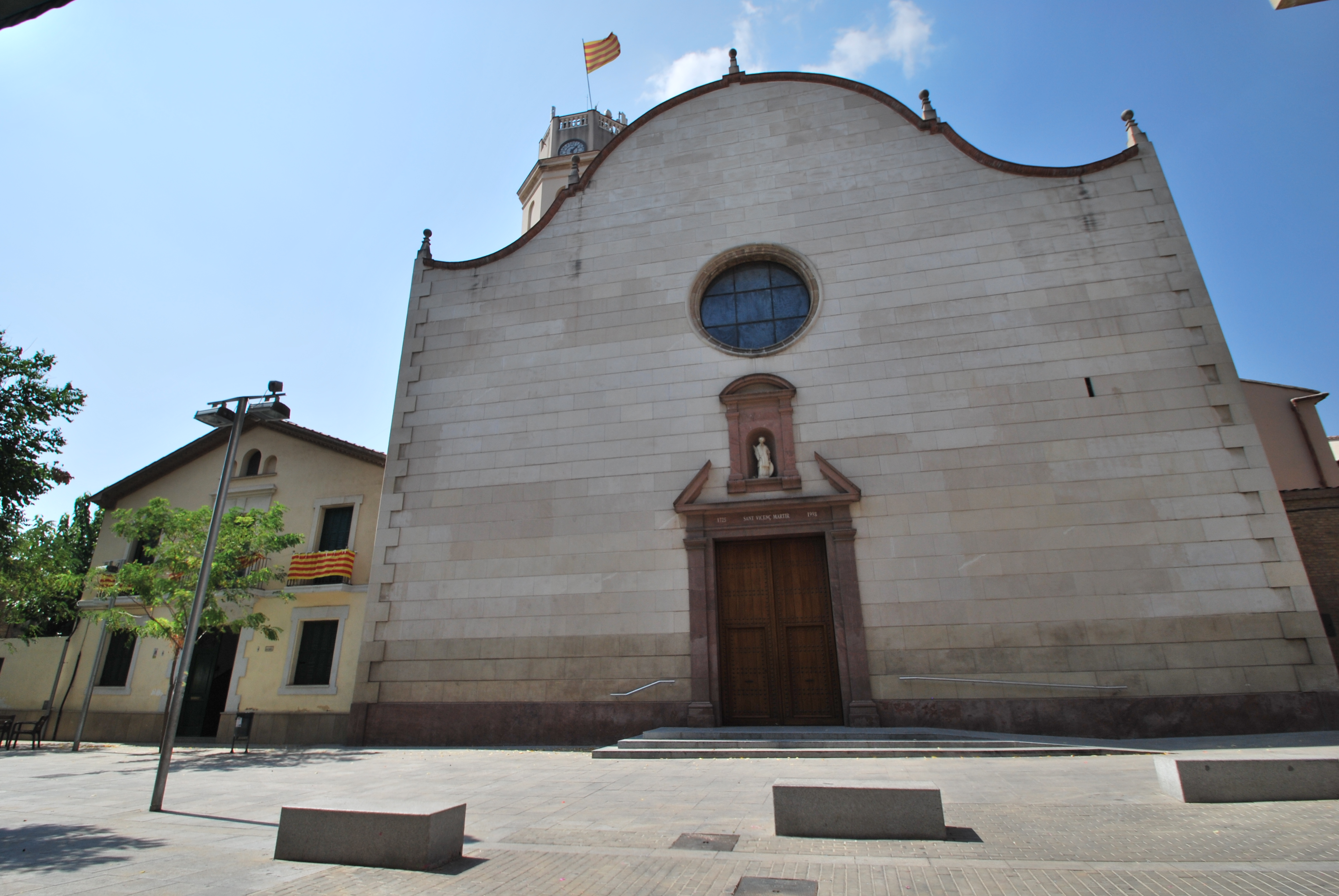 Església parroquial de Sant Vicenç (Sant Vicenç dels Horts)